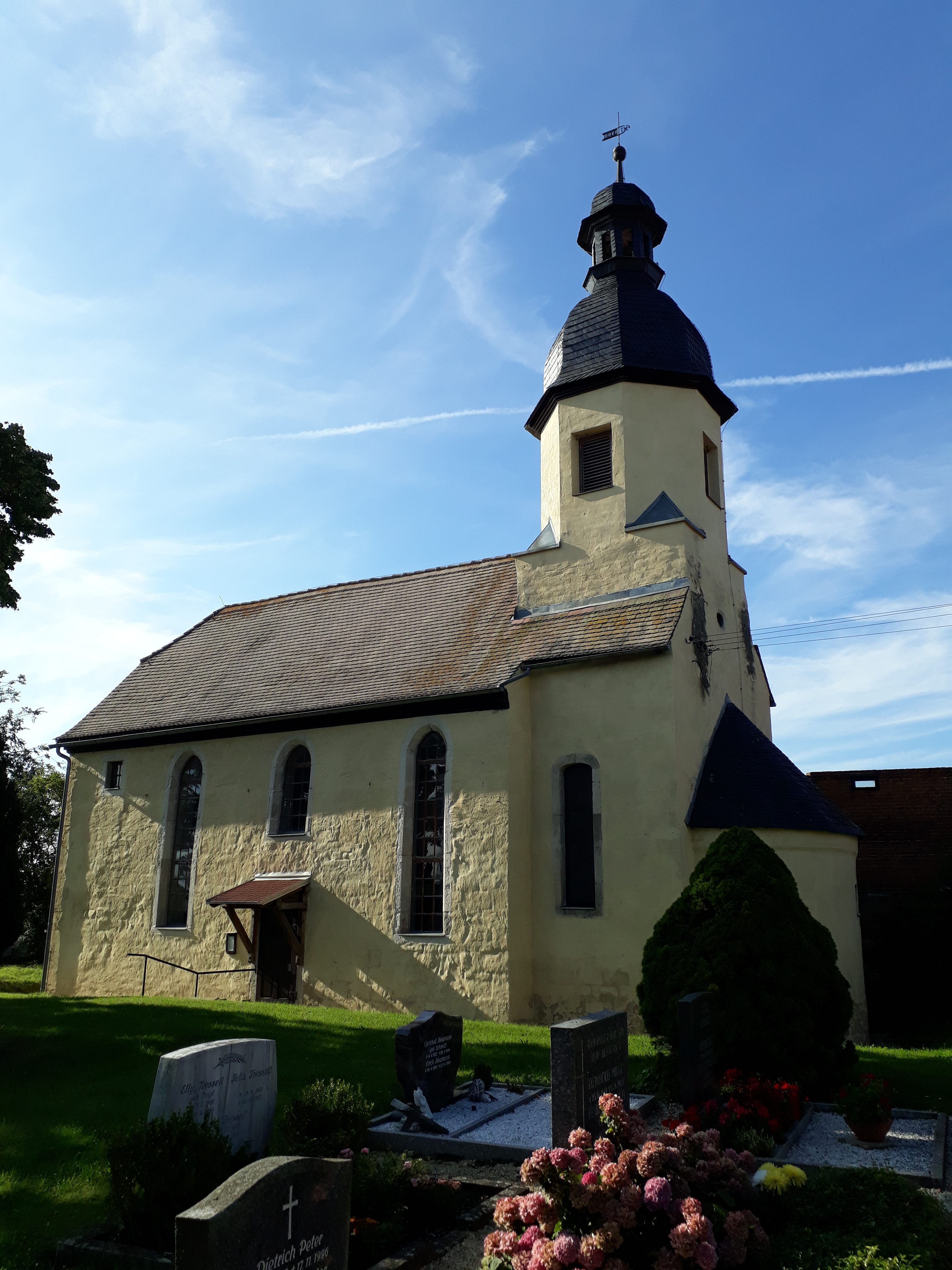 Kirche in Dothen, Thüringen